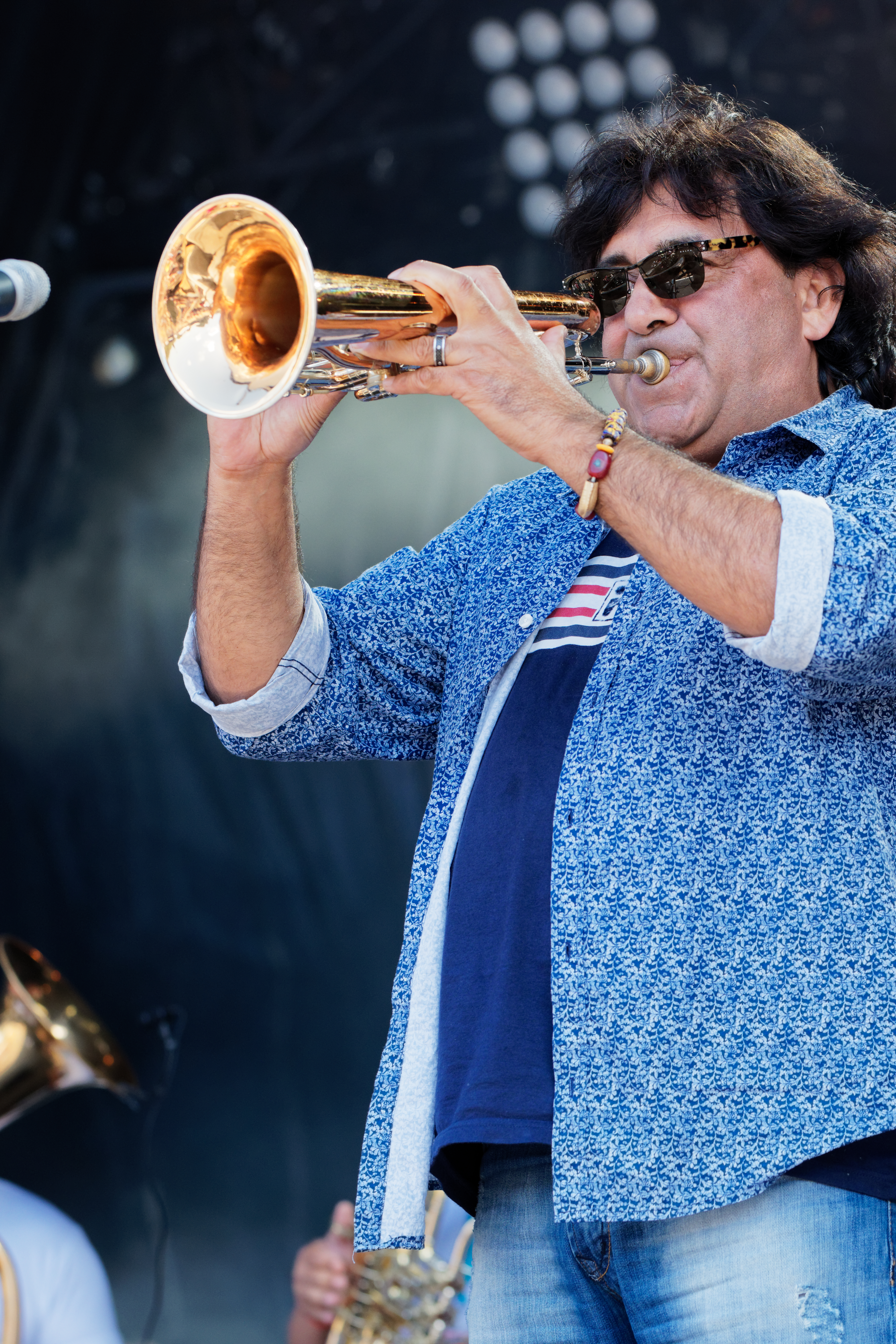 Boban Markovic Orkestar en concert sur la scène Landaoudec lors du festival du Bout du Monde 2017 à Crozon dans le Finistère (France).